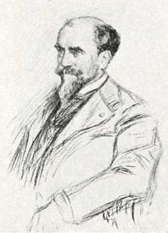 "M. Dervillé".